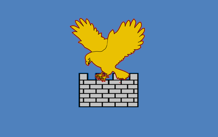 Bandiera della Regione Friuli-Venezia Giulia (Italia)